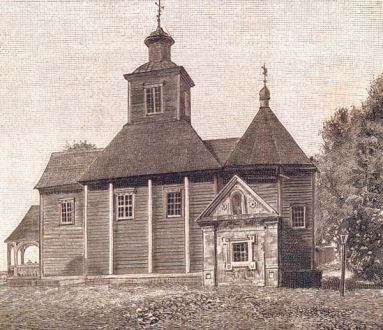 Деревянная церковь Рождества Богородицы, построенная гвардейцами Петра Великого в память победы у деревни Лесной Гравировал худ. М. Рашевский. Нива. 1899.